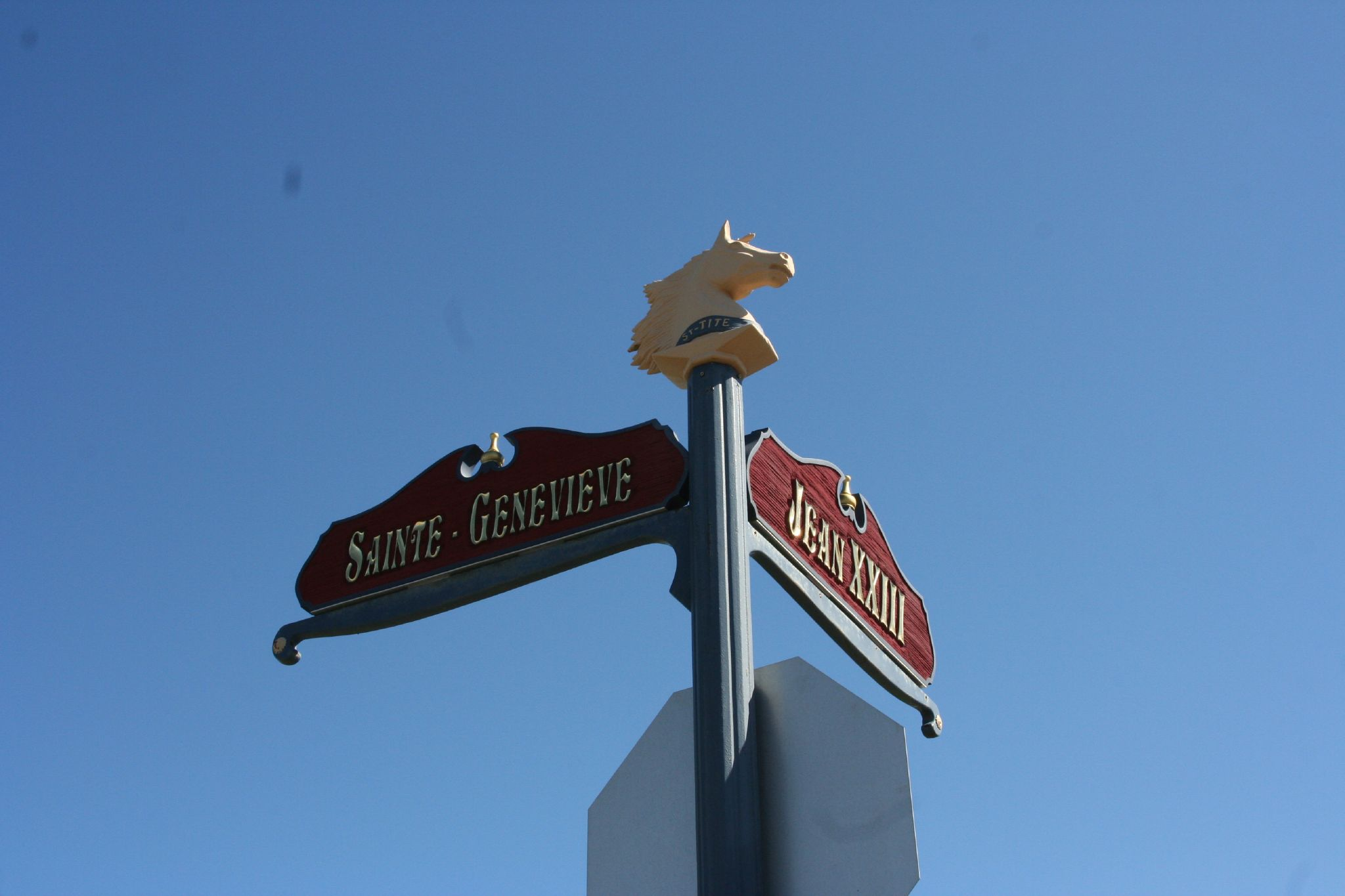 St-Tite